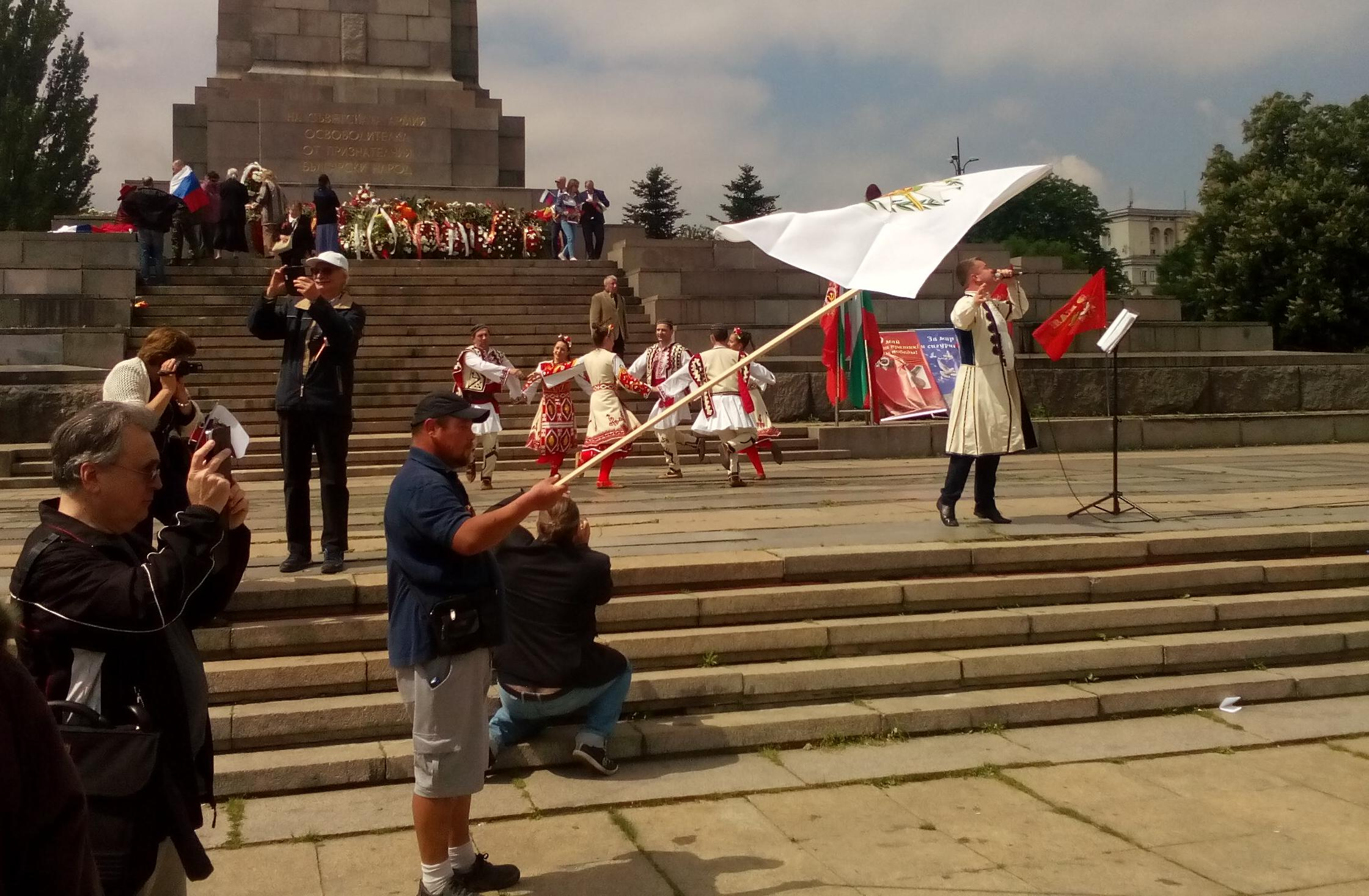 Илия Луков пее пред паметника на Съветската армия в София по случай Деня на победата - 9 май